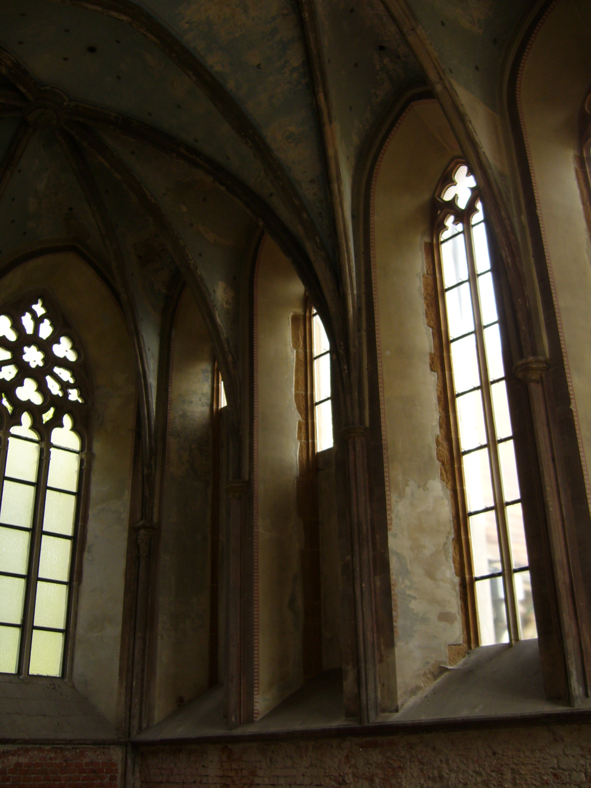 Kaplica zamkowa w Raciborzu, fragment wnętrza